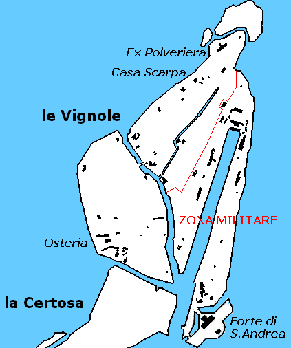 Mappa delle Vignole.